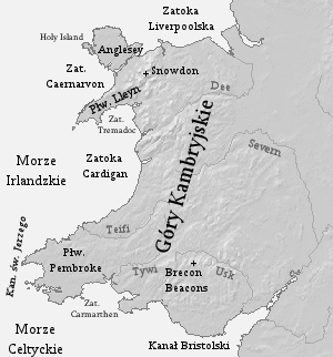 Mapa Walii